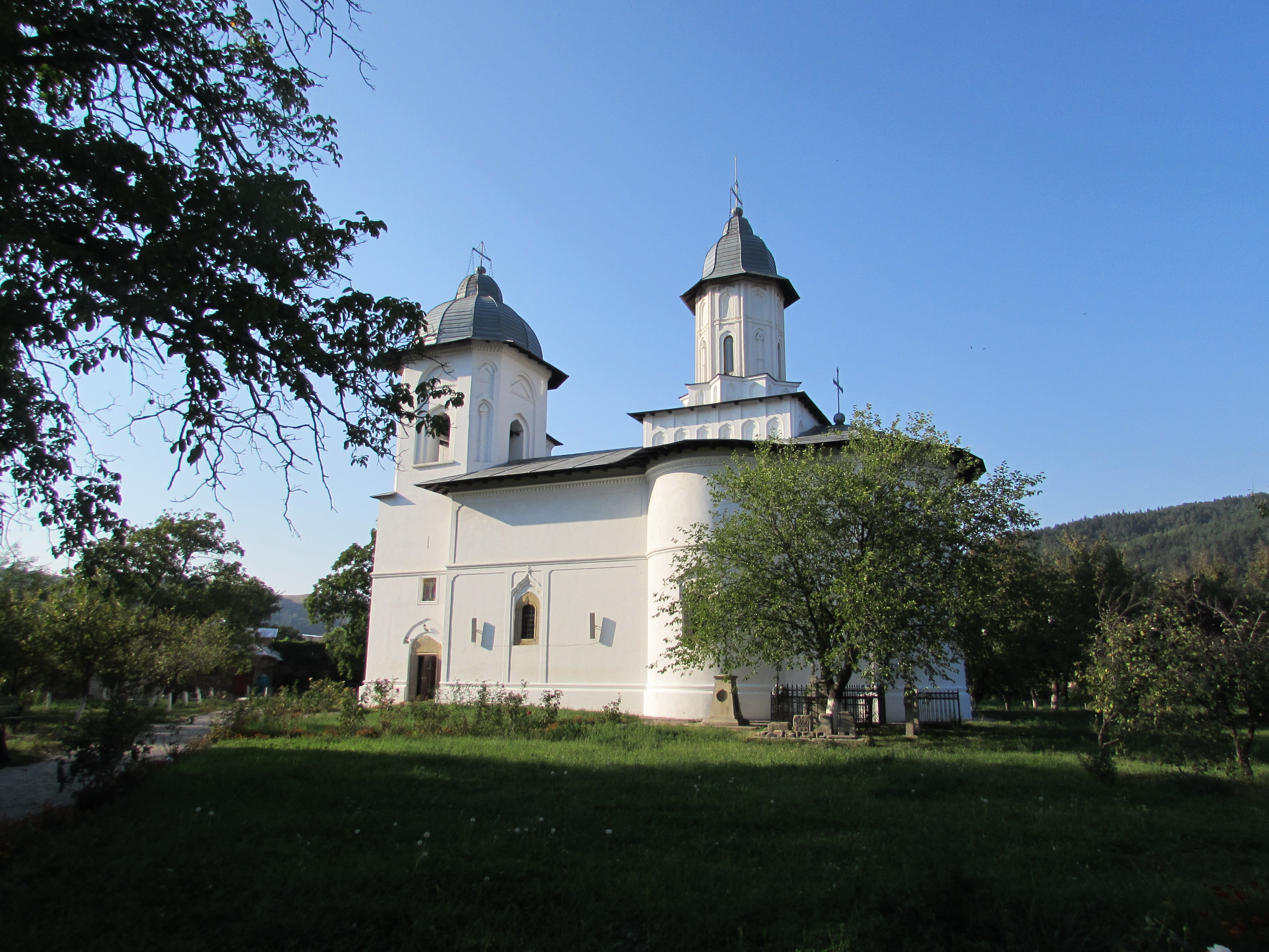 Biserica „Buna Vestire” din Târgu Ocna 01